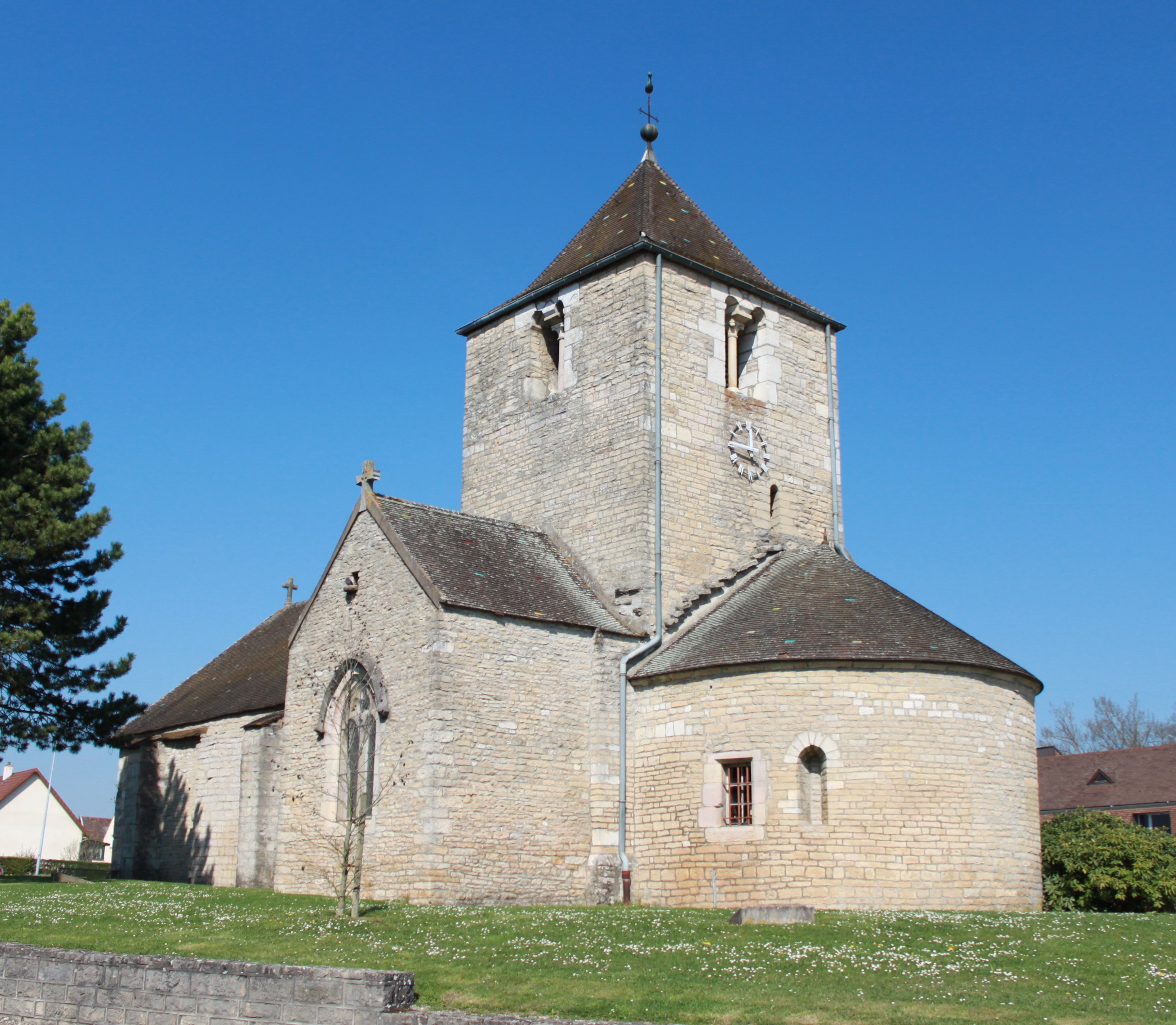 Eglise de la Sainte-Trinité, Chevigny-Saint-Sauveur, Bourgogne, FRANCE